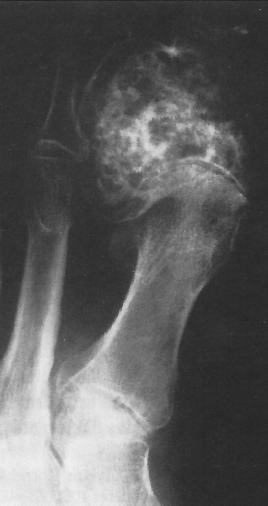 Ungewöhnliche Lokalisation eines Chondrosarkoms im Großzeh.